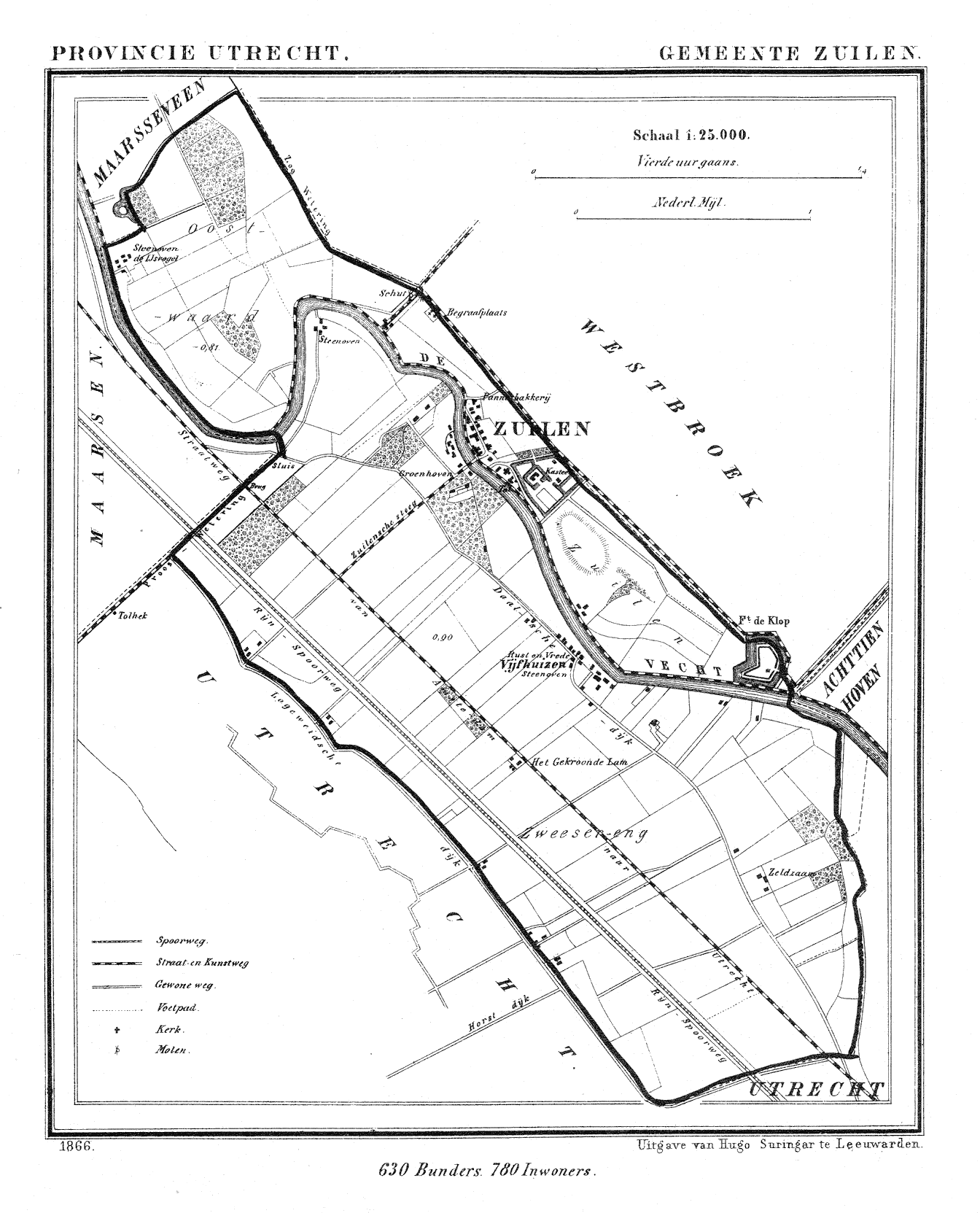 Map of Zuilen